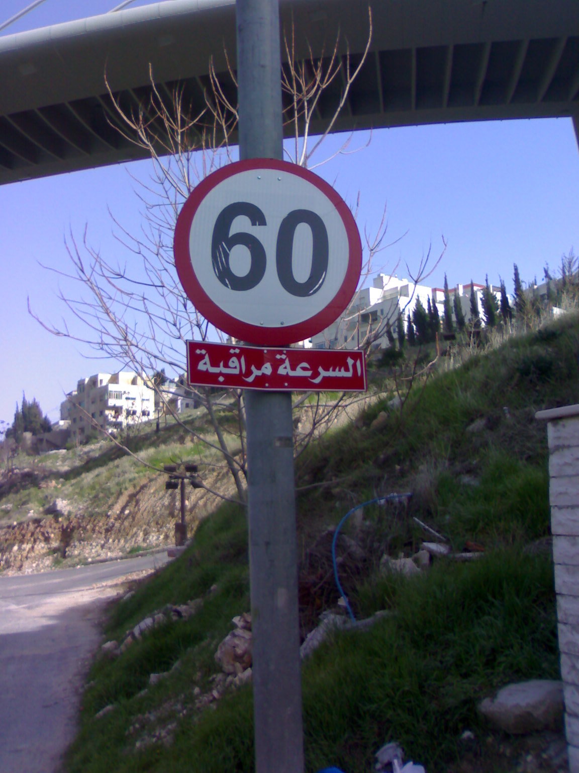 إشارة مرور في الأردن تخبر السائق ان عليه التقيد بحدود السرعة وهي كما تخبر الإشارة 60 كم/ساعة.